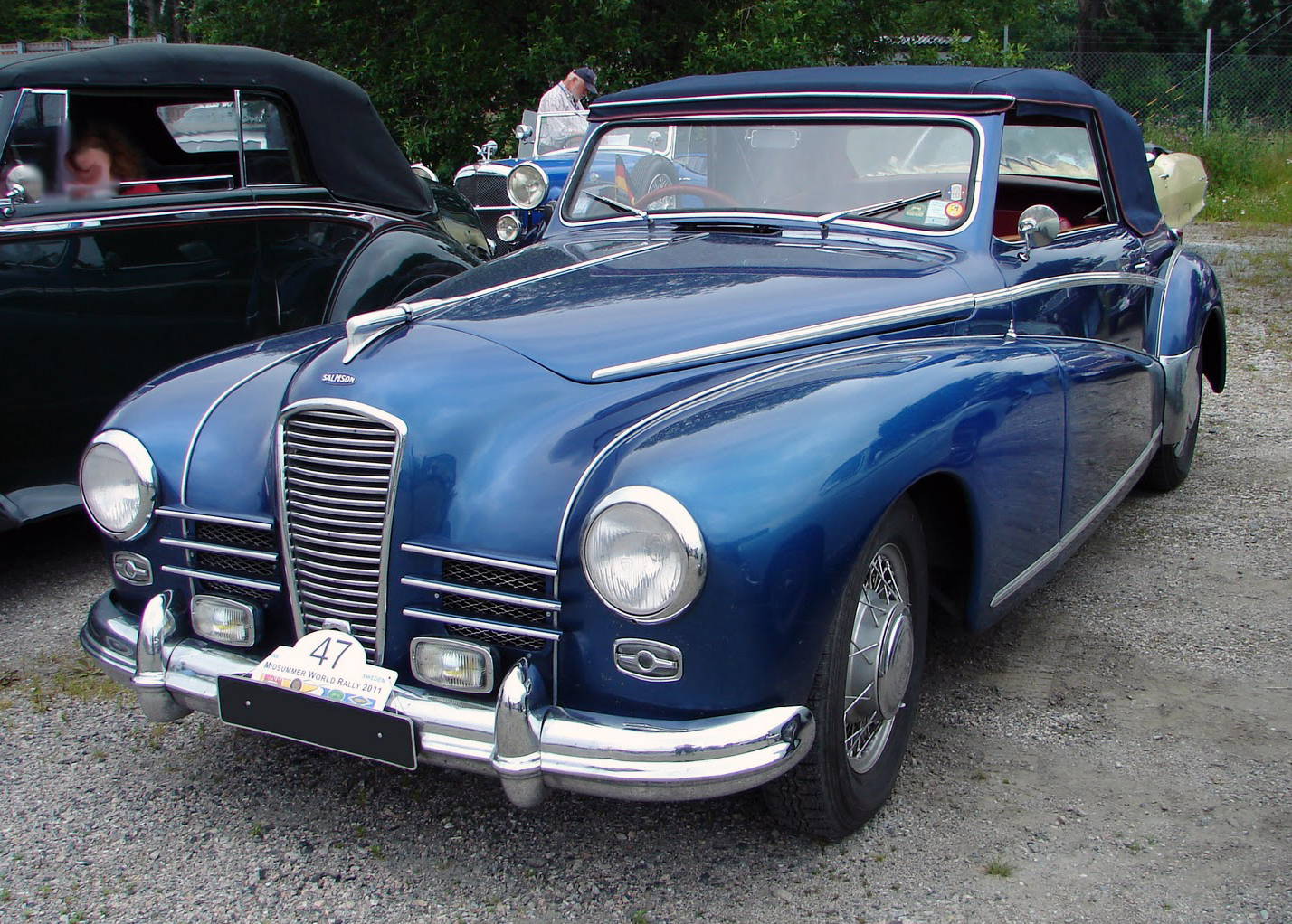 Salmson Randonnée Cabriolet G 72 Ter 1954, seen in Trollhättan, Sweden